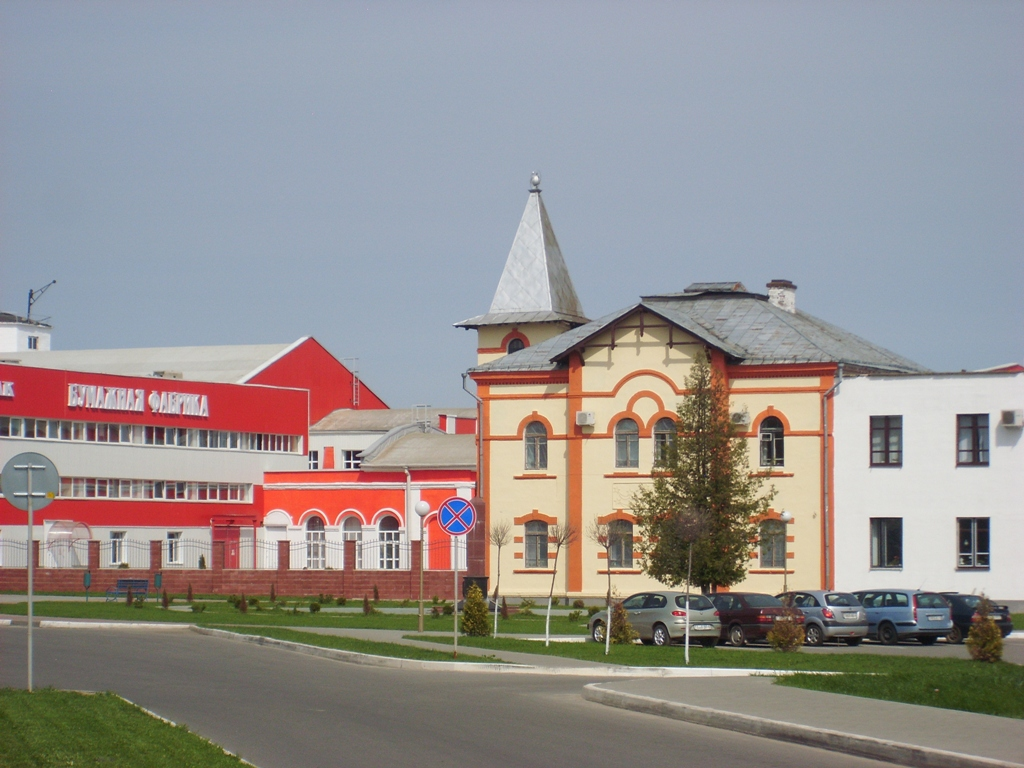 Шклоў. Папяровая фабрыка